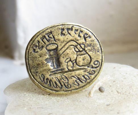 חותמתו של ר' יצחק גלין / גלינע. במרכזה תמונה של מזקקה המעידה על התעניינותו בהפקת משקים חריפים.